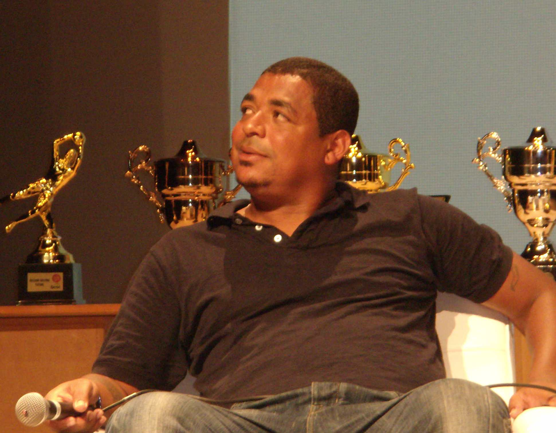 Marcos André Batista Santos, mais conhecido como Vampeta (Nazaré, 13 de março de 1974), é um treinador e ex-futebolista brasileiro que atuava como volante. Atualmente, exerce o cargo de dirigente esportivo do Grêmio Osasco. Sempre se destacou por ser um jogador polêmico.